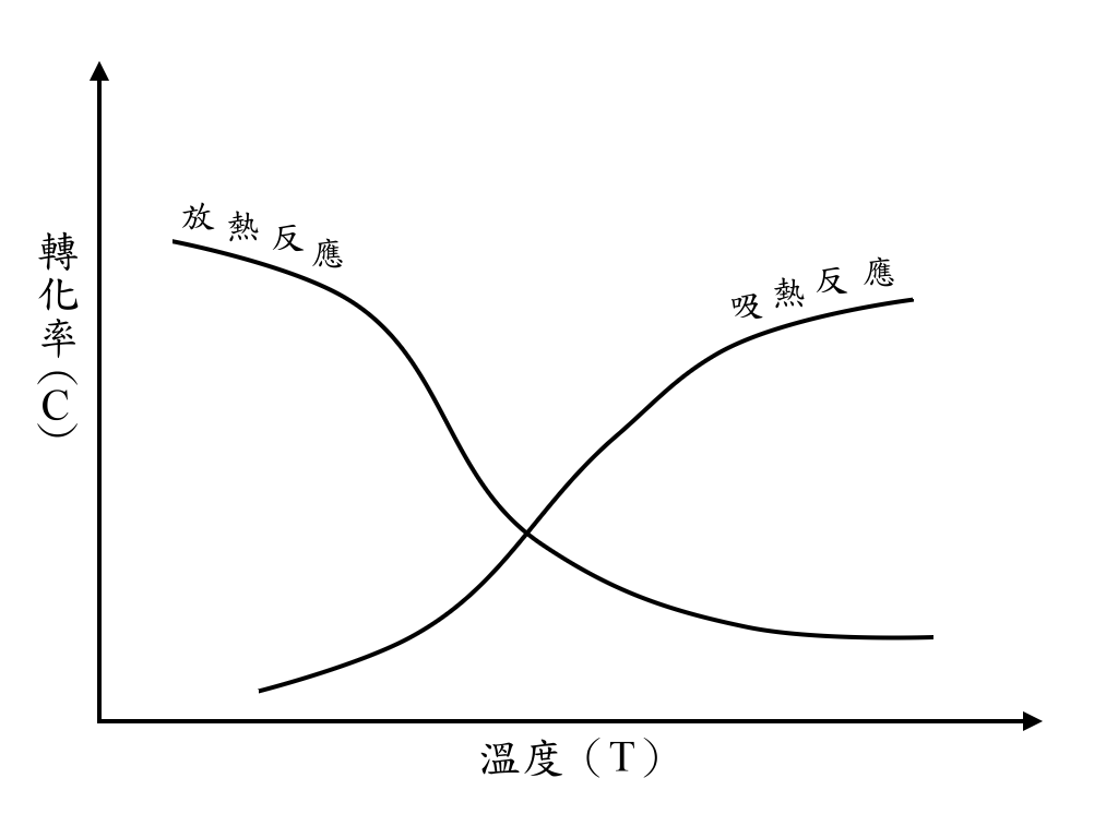 參考《化工百科全書》第七卷(isbn = 7-5025-2067-8) 圖26繪製